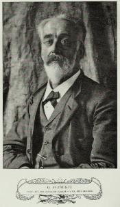 Gustave Huberti (1843-1910), Vlaams componist